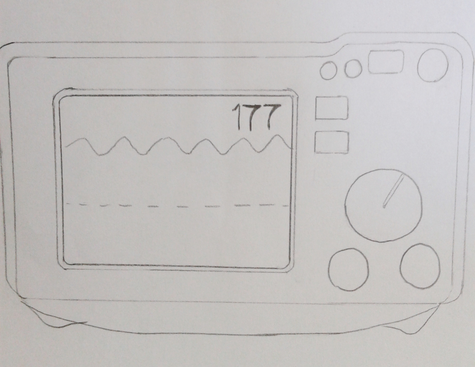 Defibrilator manual dalaman